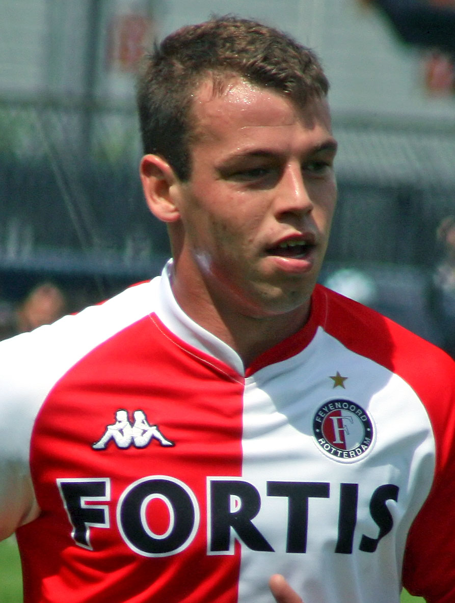 Nicky Hofs (Feyenoord)